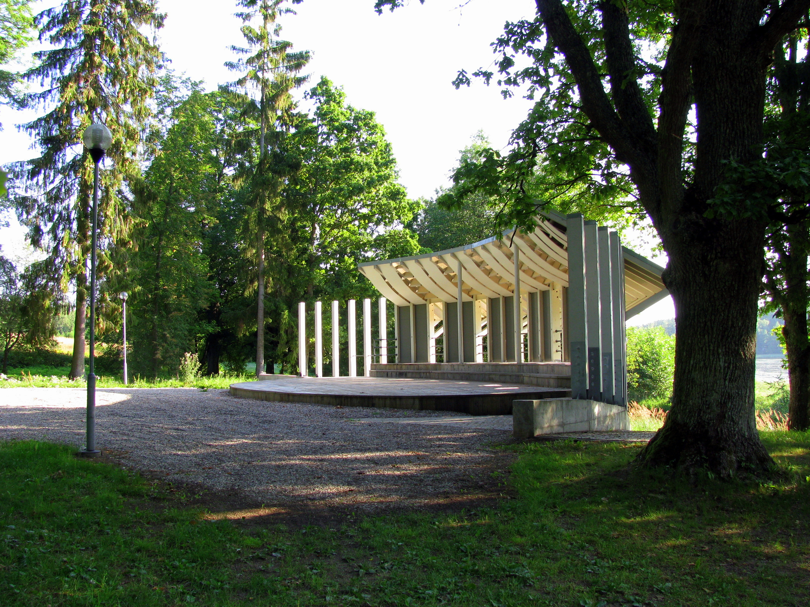 Estrāde Spāres parkā. Open stage at Spāre. August, 2014